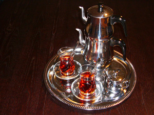 Caydanlik-Teegeschirr auf Tablett mit Trinkgläsern und Zuckerdose